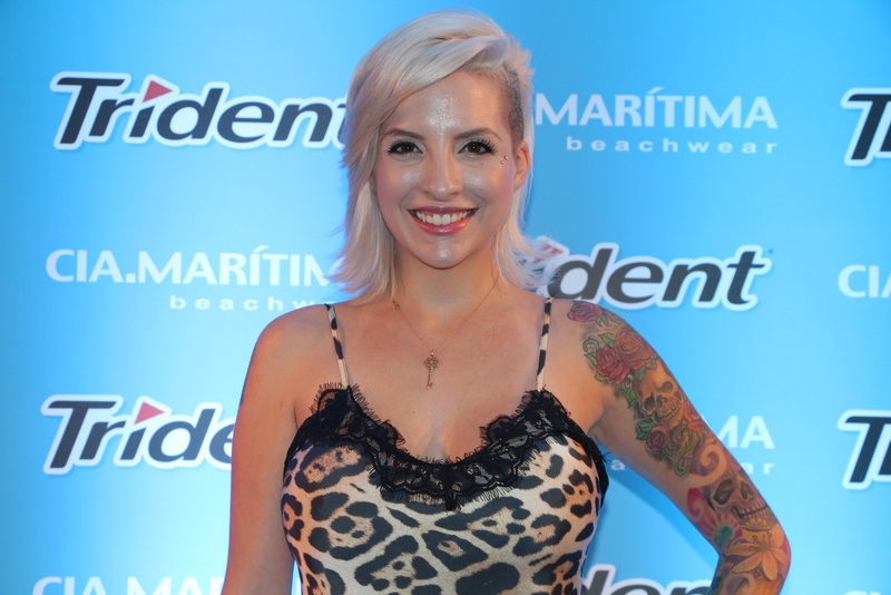 13 - Clara-002